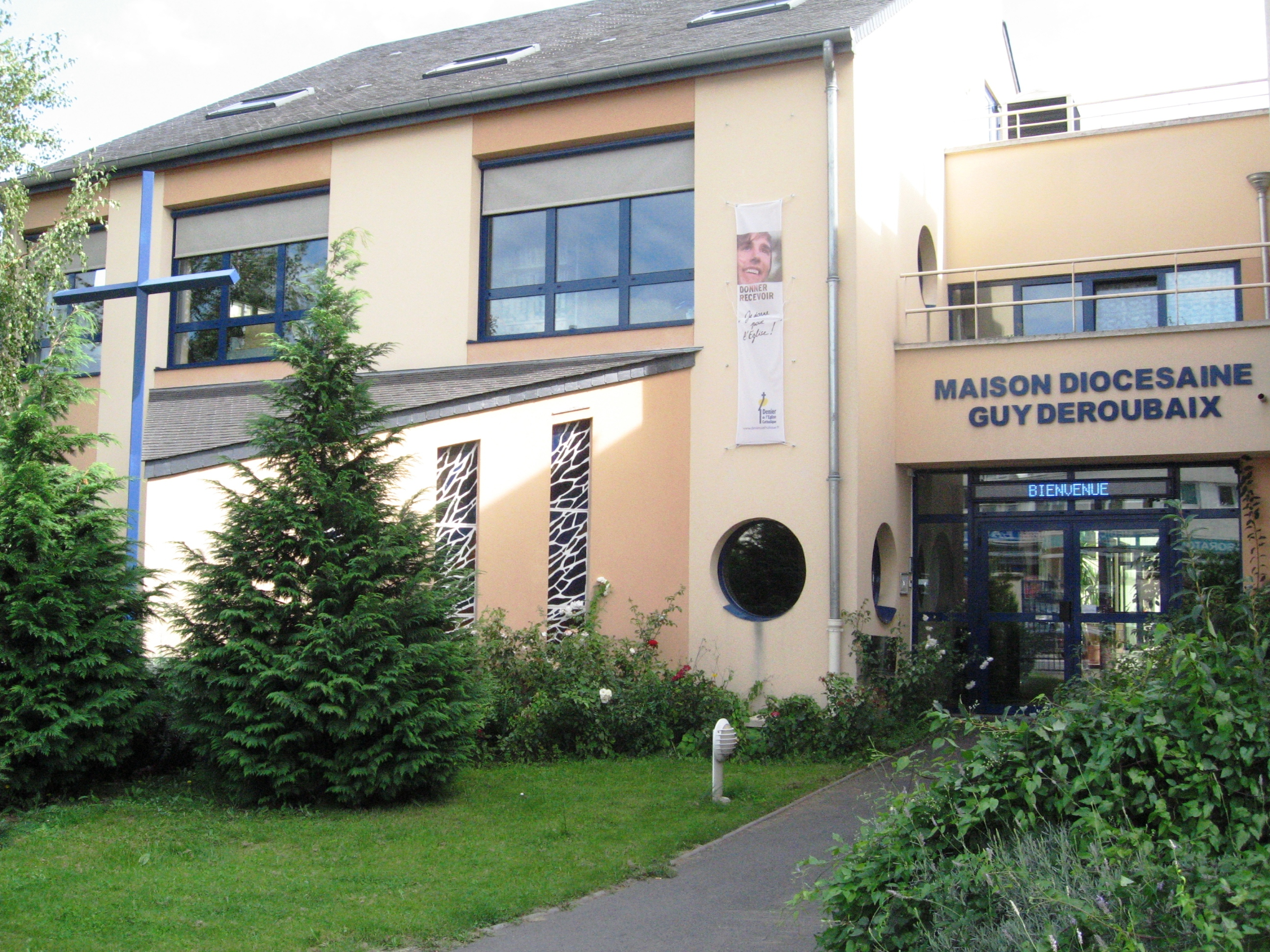 Maison diocésaine où sont regroupés la majeure partie des services du diocèse de Saint Denis (Eglise catholique en Seine-Saint-Denis)